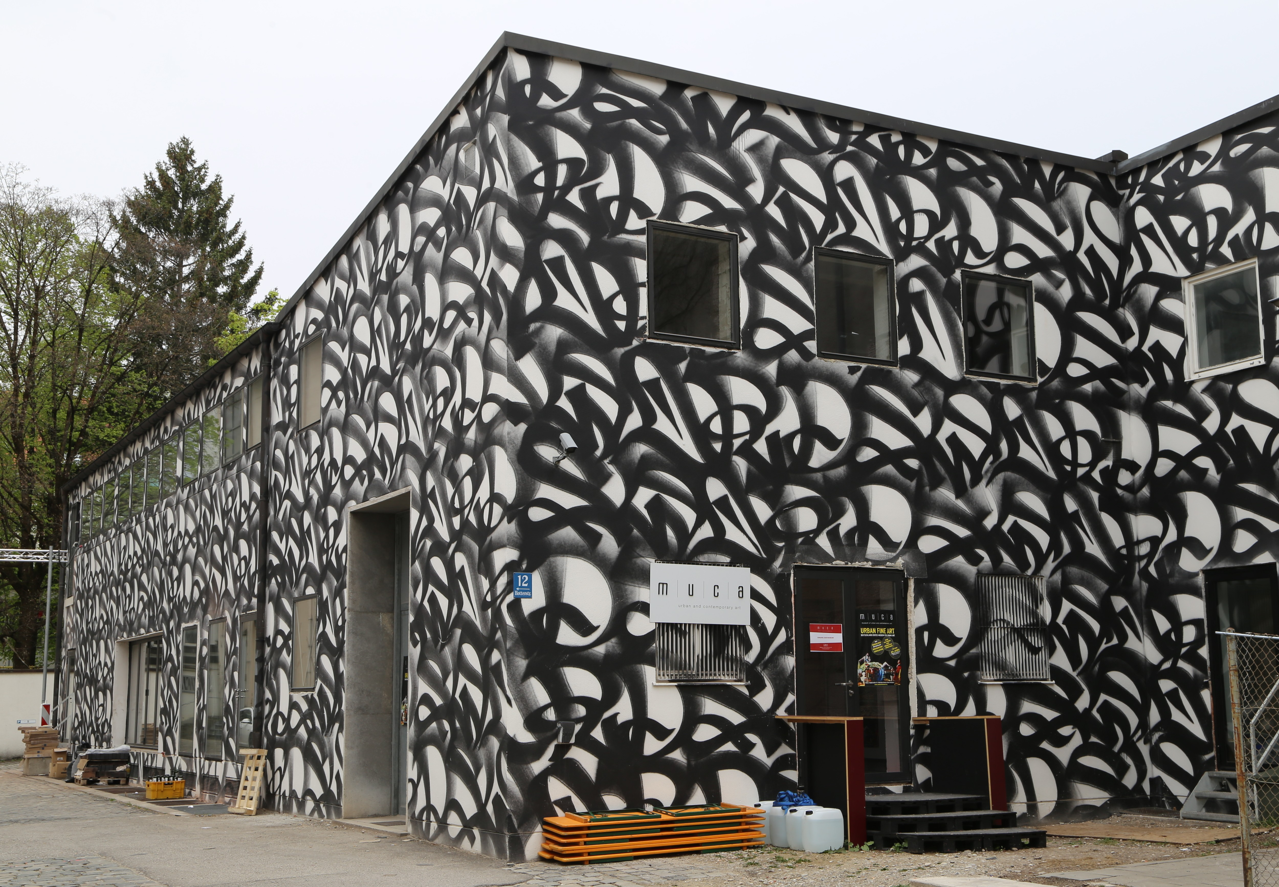 Museum of Urban and Contemporary Art, Hotterstraße 12, München